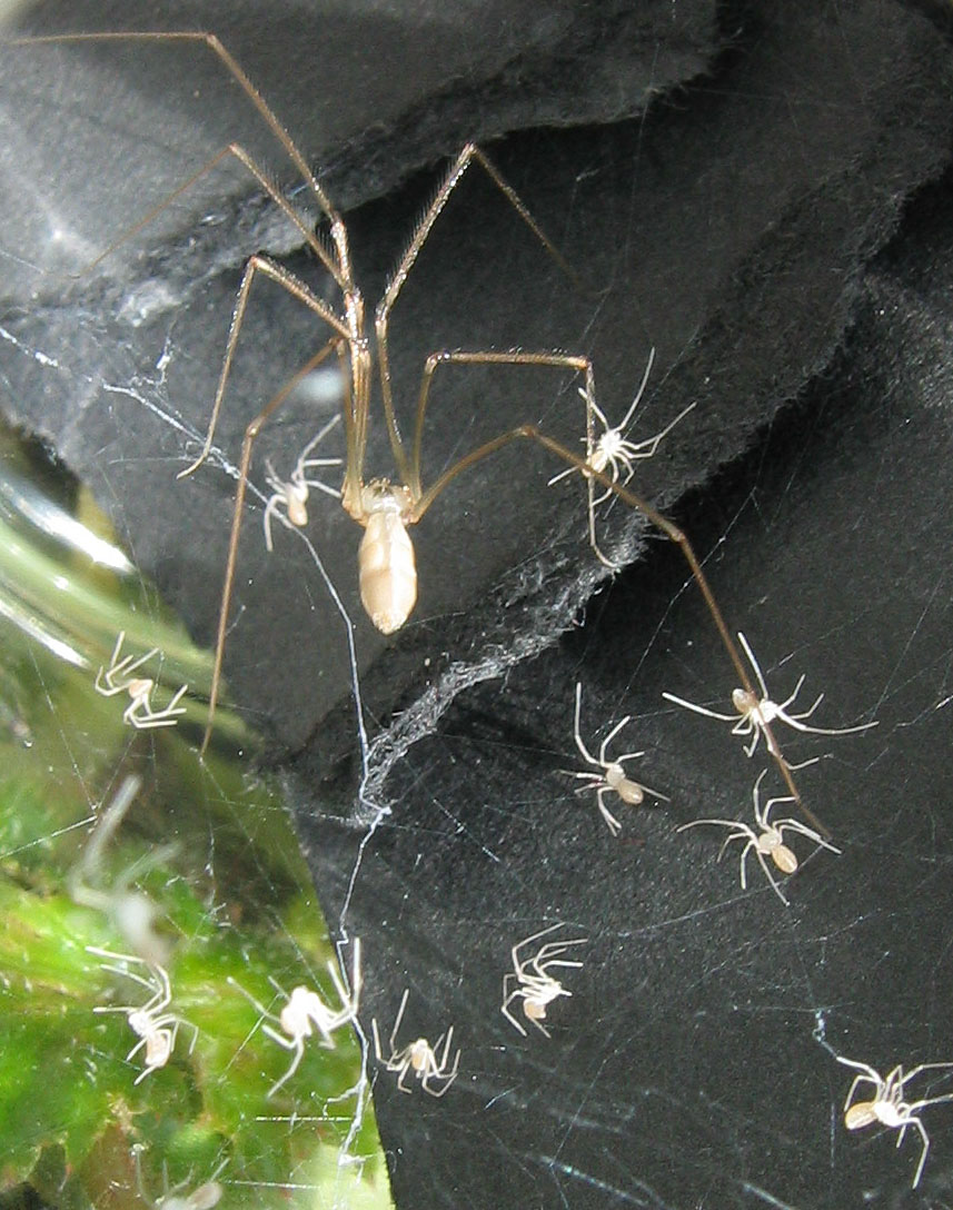 Samica nasosznika trzęsia z młodymi